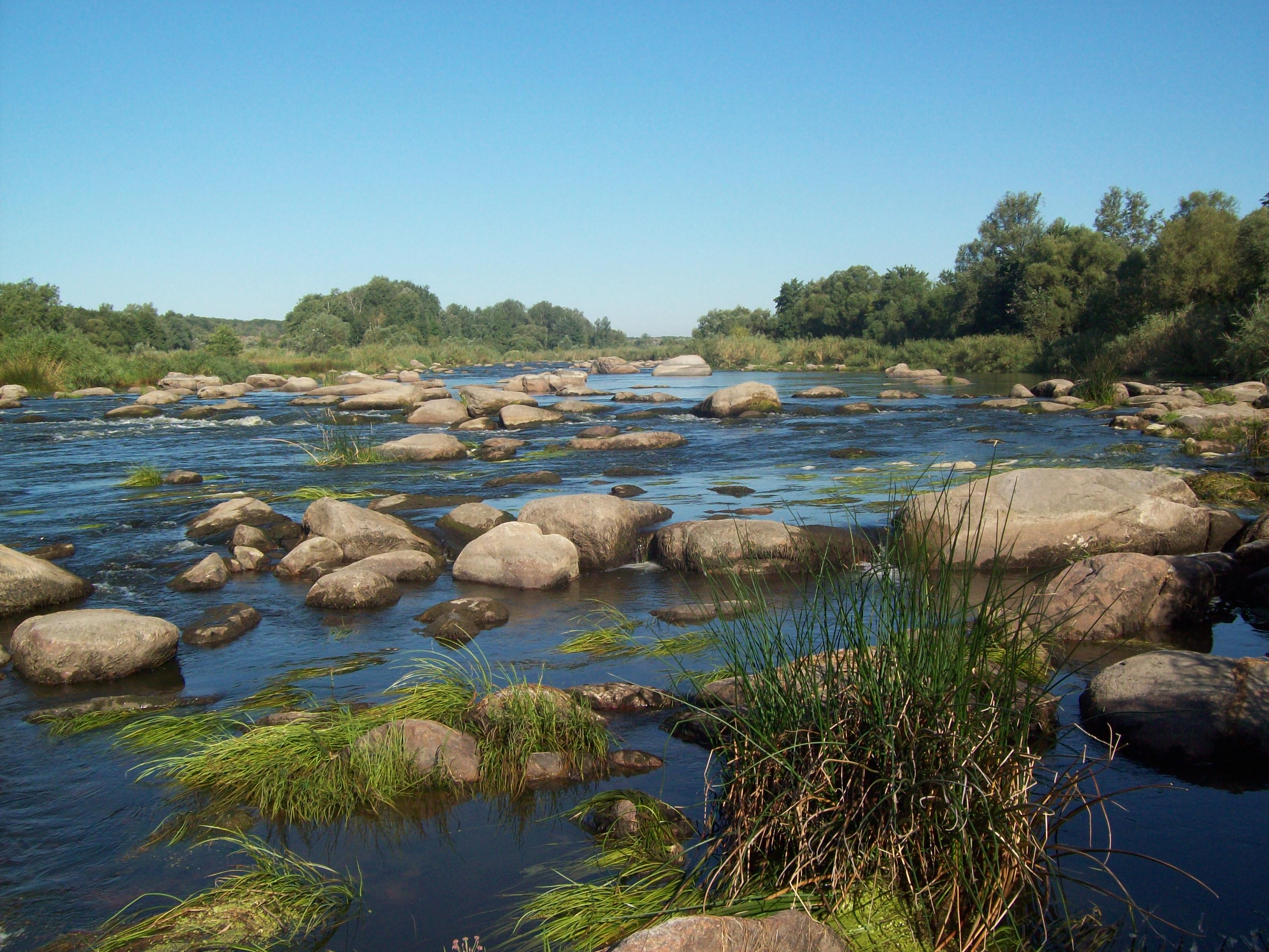 Знято фотоапаратом KODAK C-813